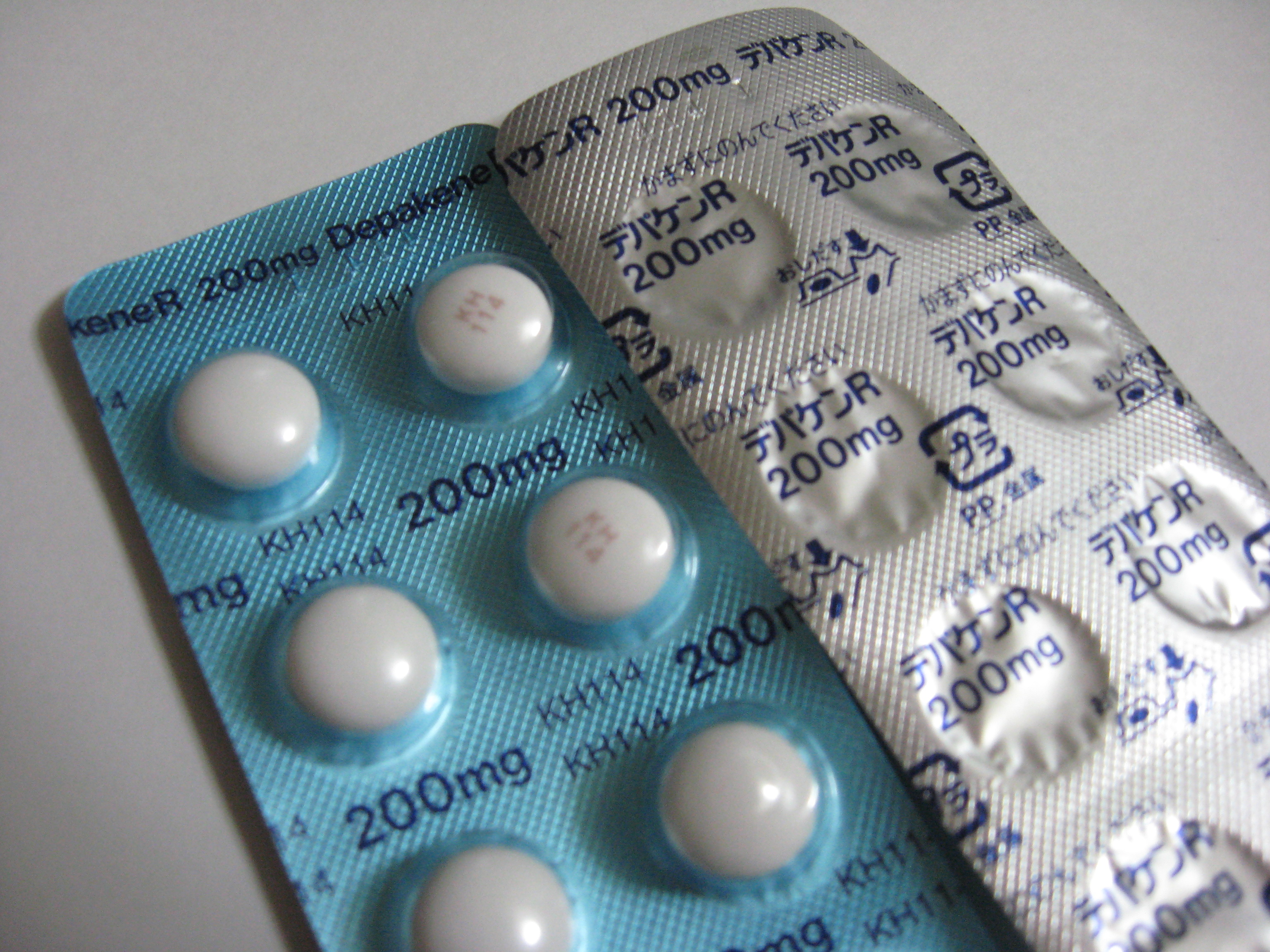 デパケンR 200mg錠(バルプロ酸ナトリウム製剤、徐放剤)